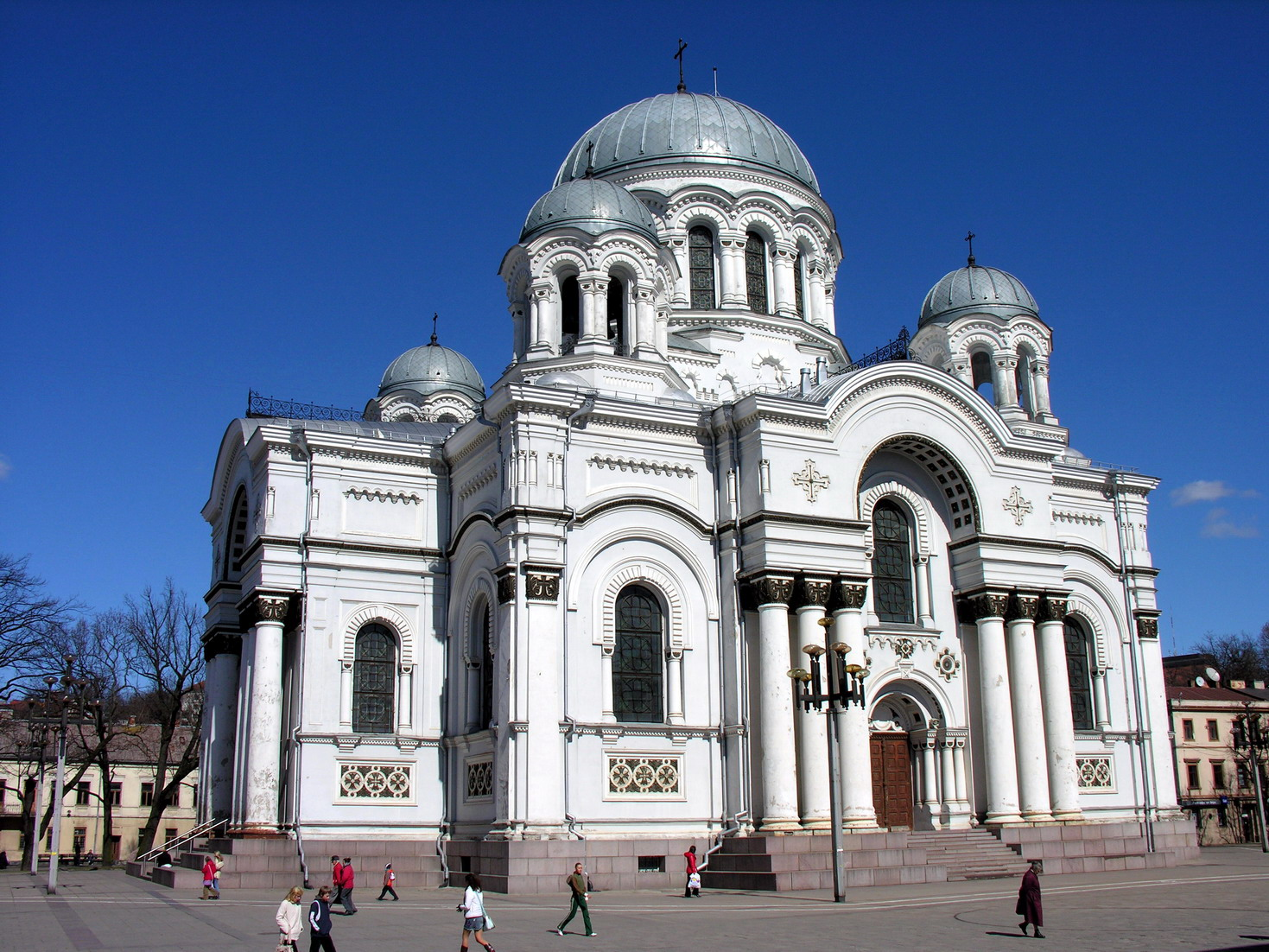 Šv. arkangelo Mykolo (Įgulos) bažnyčia, Kaunas.